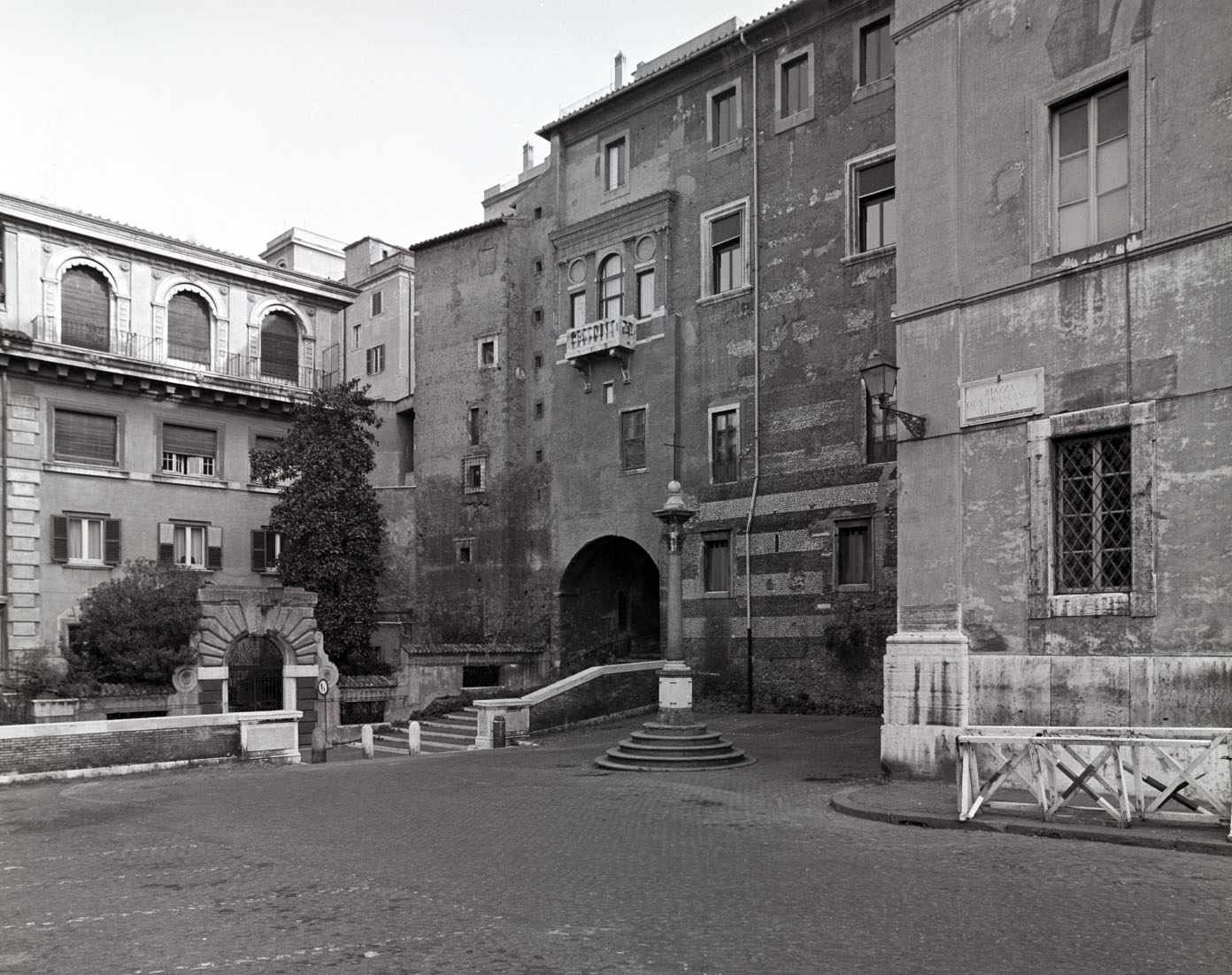 Piazza San Francesco di Paola, Rome.